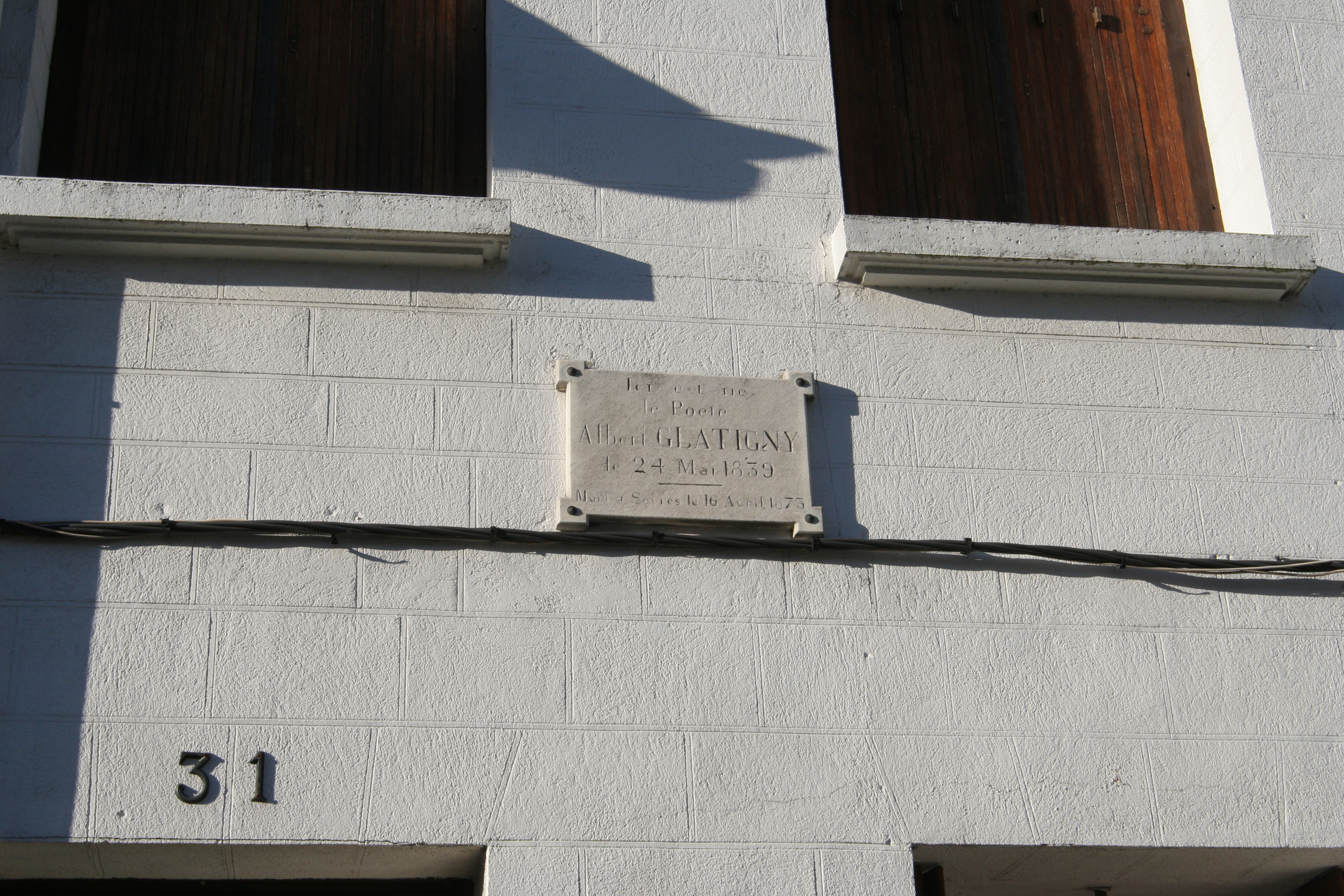 Maison natale du poète Albert Glatigny à Lillebonne, 31 rue Césarine.